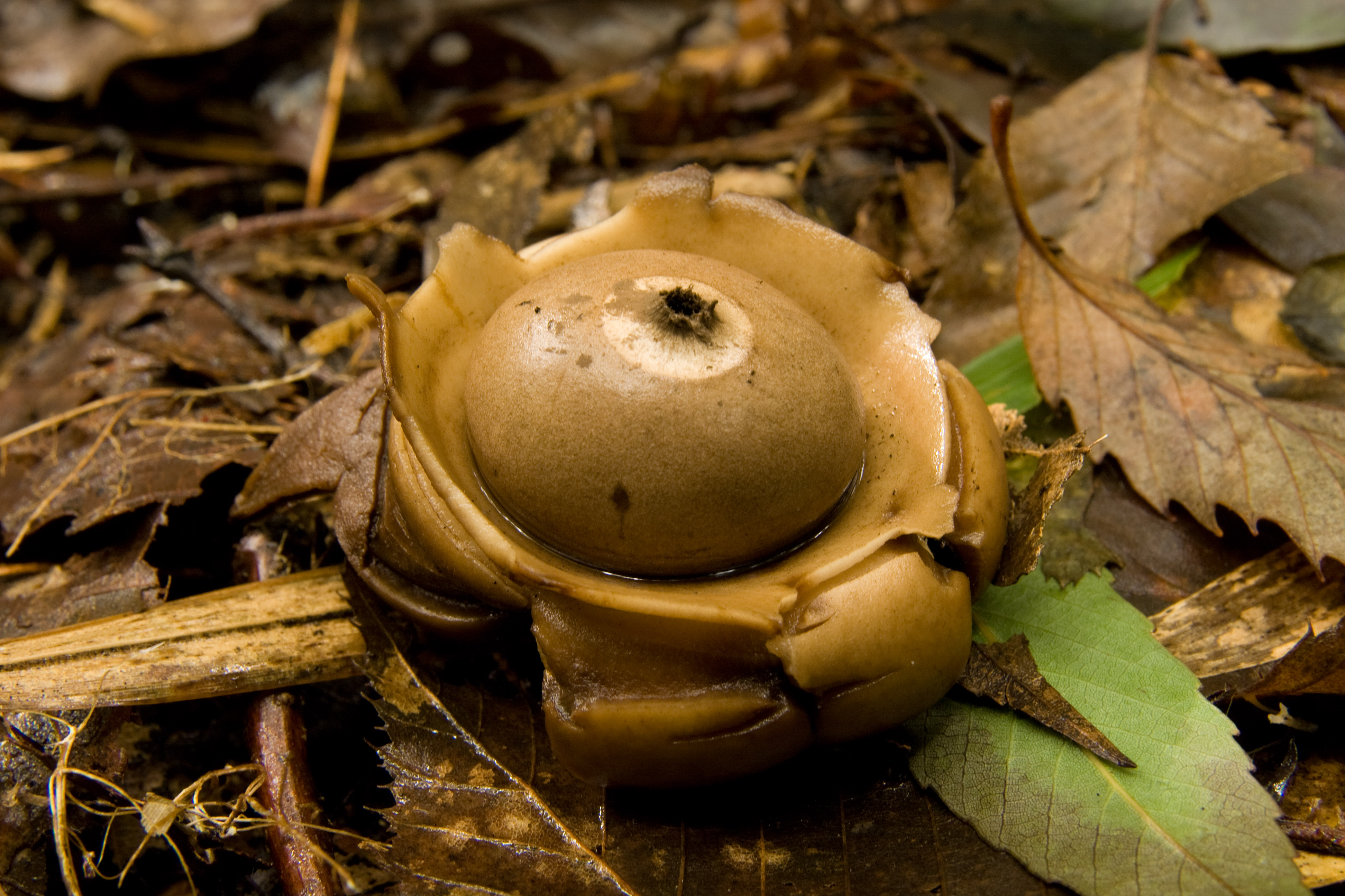 エリマキツチグリ (学名：Geastrum triplex)